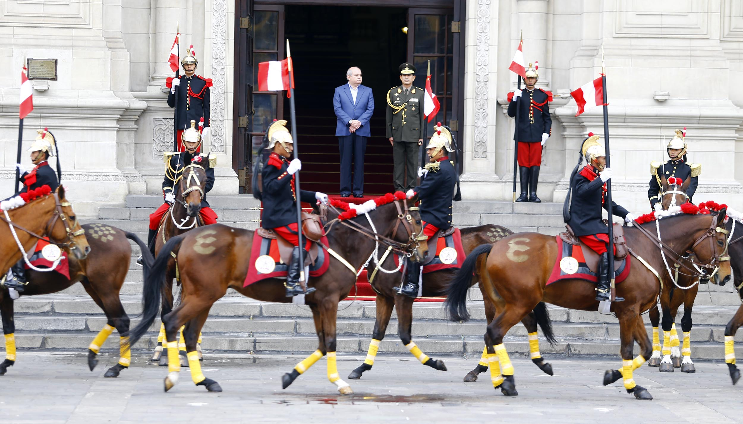 El ministro de Defensa, Pedro Cateriano Bellido, preside la ceremonia de cambio de guardia en Palacio de Gobierno.